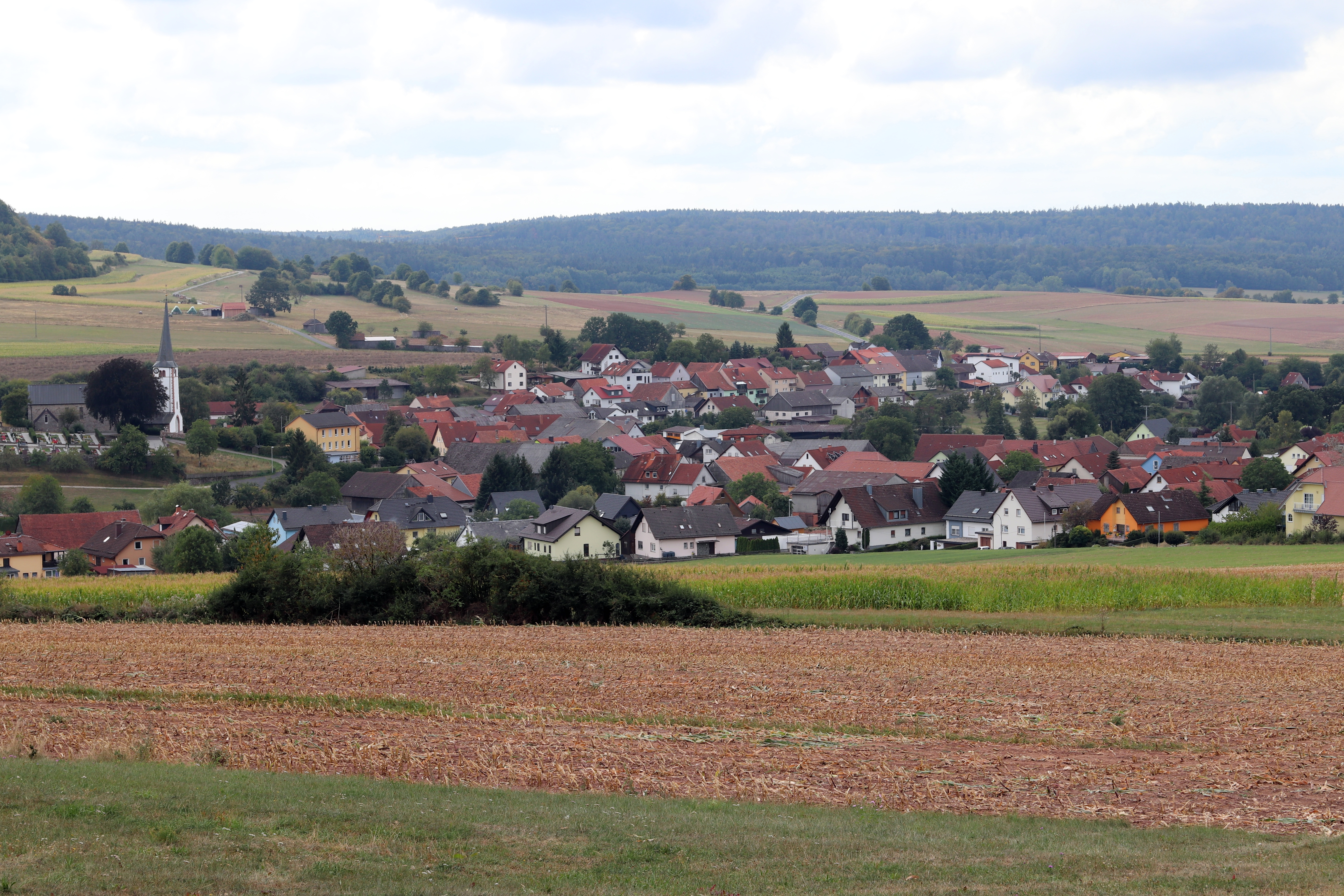 Blick auf Schondra vom Zugangsweg zum Lindenstumpf aus